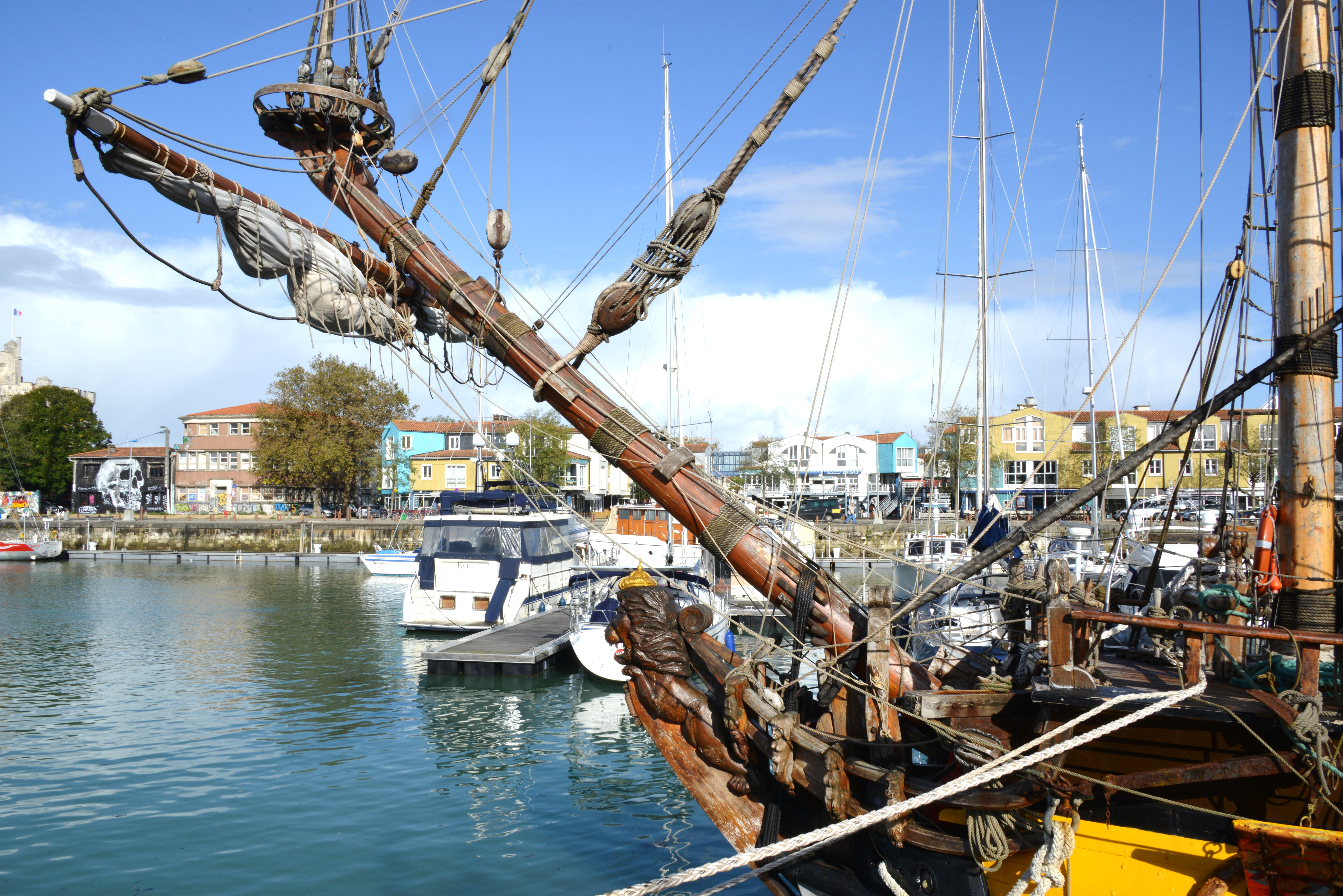 La mâture de la frégate russe Shtandart (Штандартъ) amarrée au Quai d’ Honneur dans le Bassin des Chalutiers lors de son escale à La Rochelle en octobre 2013. La Rochelle, Charente Maritime, France.